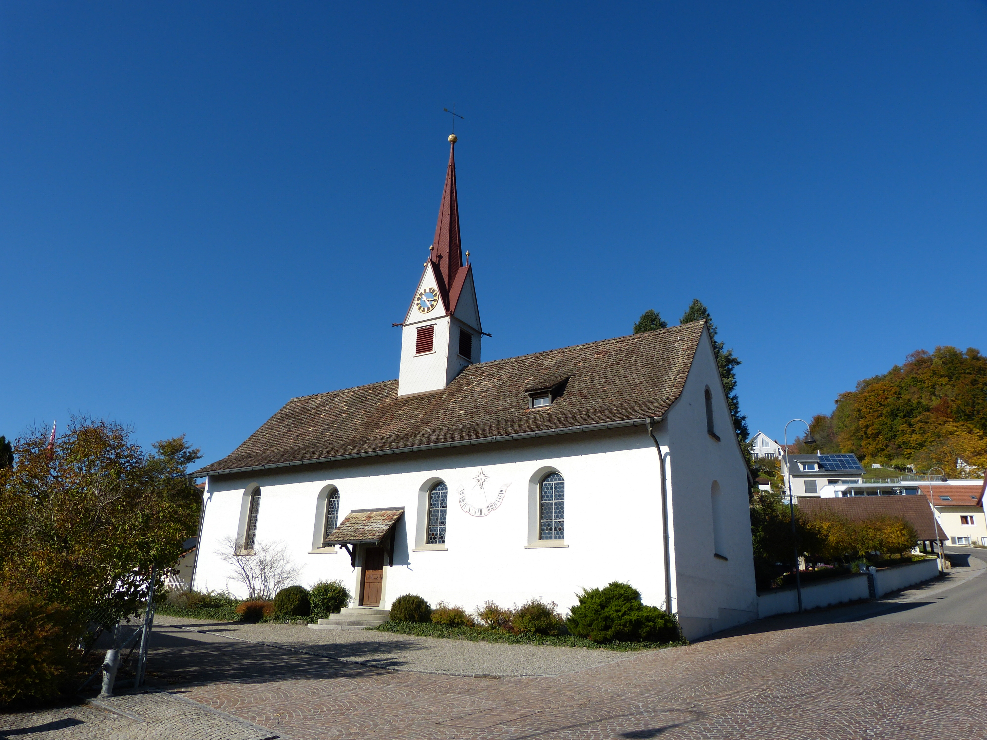 Reformierte Kirche